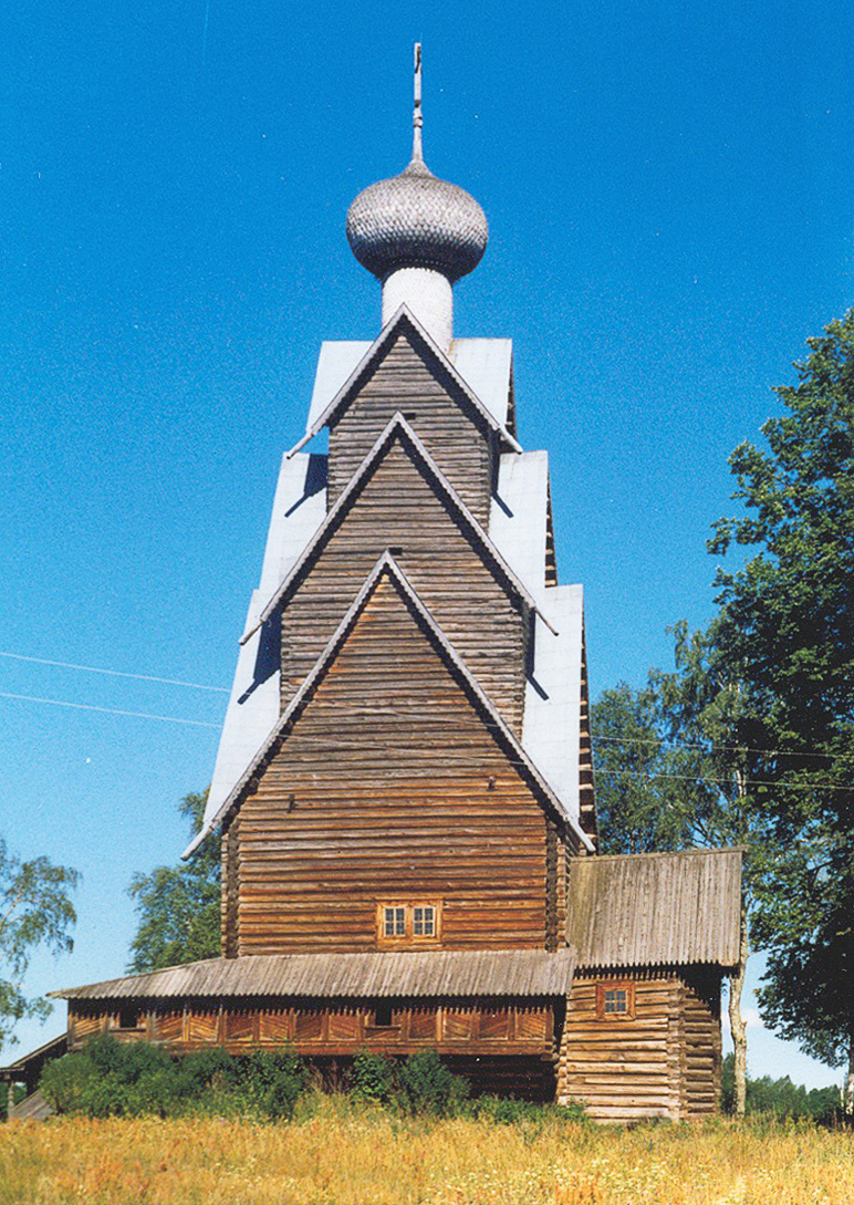 Церковь Иоанна Предтечи (деревянная) (Тверская область, Осташков, деревня Ширково (Ширков Погост))